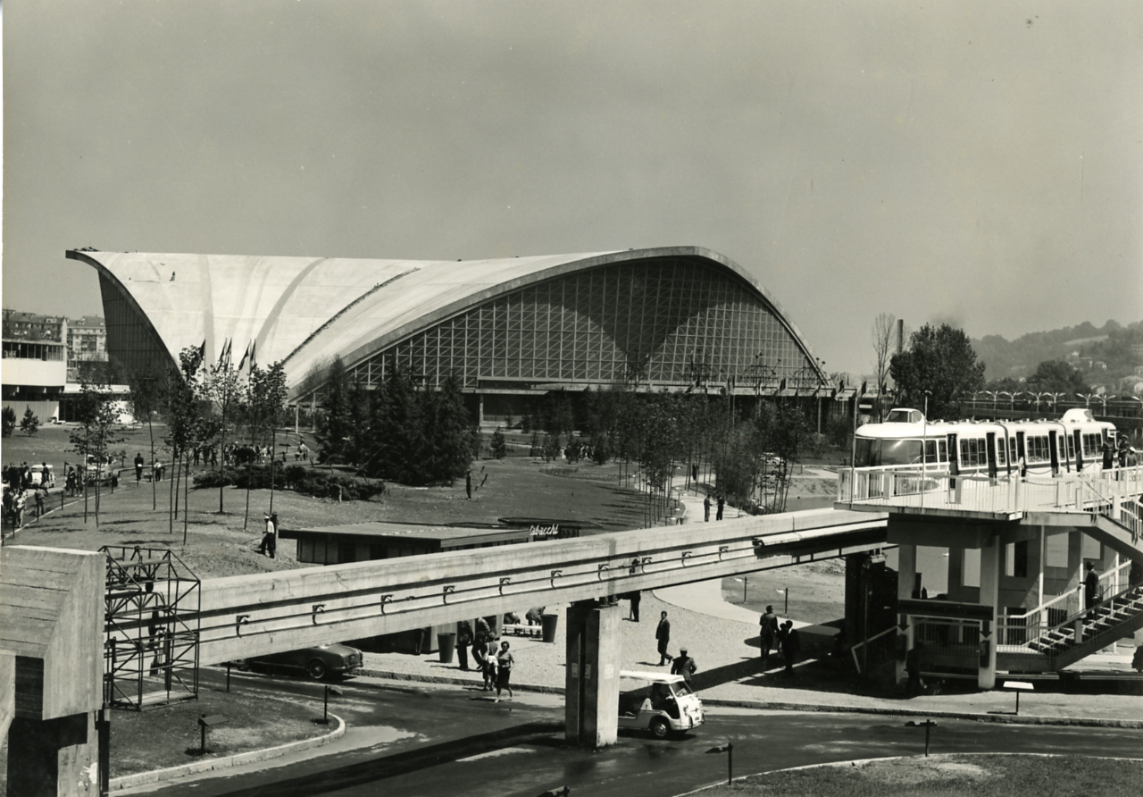 Servizio fotografico : Torino, 1961 / Paolo Monti. - Stampe: 6 : Positivo b/n, gelatina bromuro d'argento/ carta, 18x24, 24x30. - ((Al verso delle stampe manoscritto numero di negativo corrispondente: 38938, 39056, 39100, 39104. - Sul coperchio della scatola, manoscritto a pennarello: "Italia '61". - Occasione: Documentazione dell'esposizione internazionale Italia '61 tenutasi a Torino in occasione del centenario dell'unità d'Italia. - Fonte: Rubrica di Paolo Monti: Archivio fino 1-4-1961/ 31-3-1963 (1961-1963), presso Archivio Paolo Monti